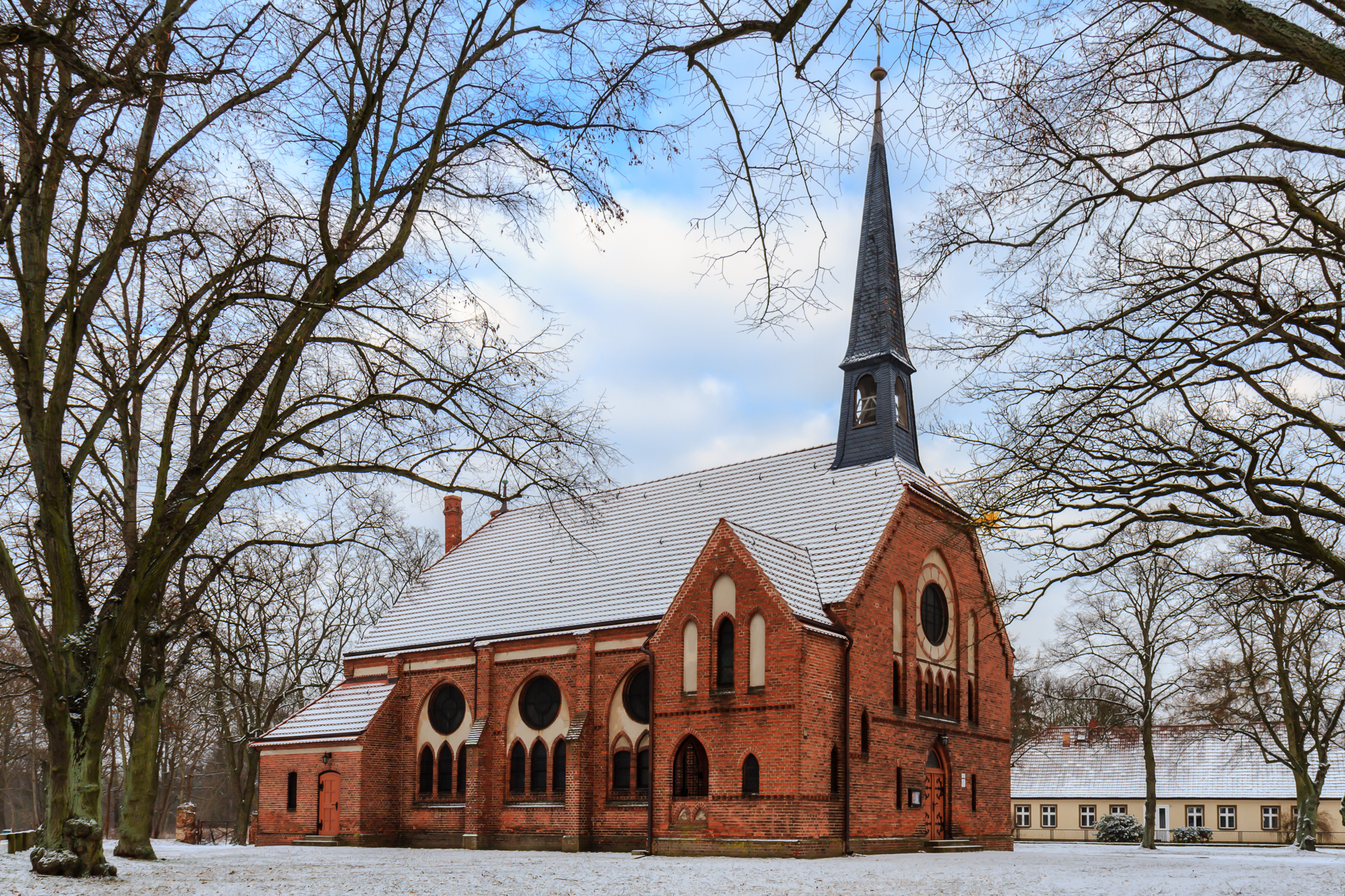 Evangelische Kirche in (Oranienburg-) Friedrichsthal, Brandenburg